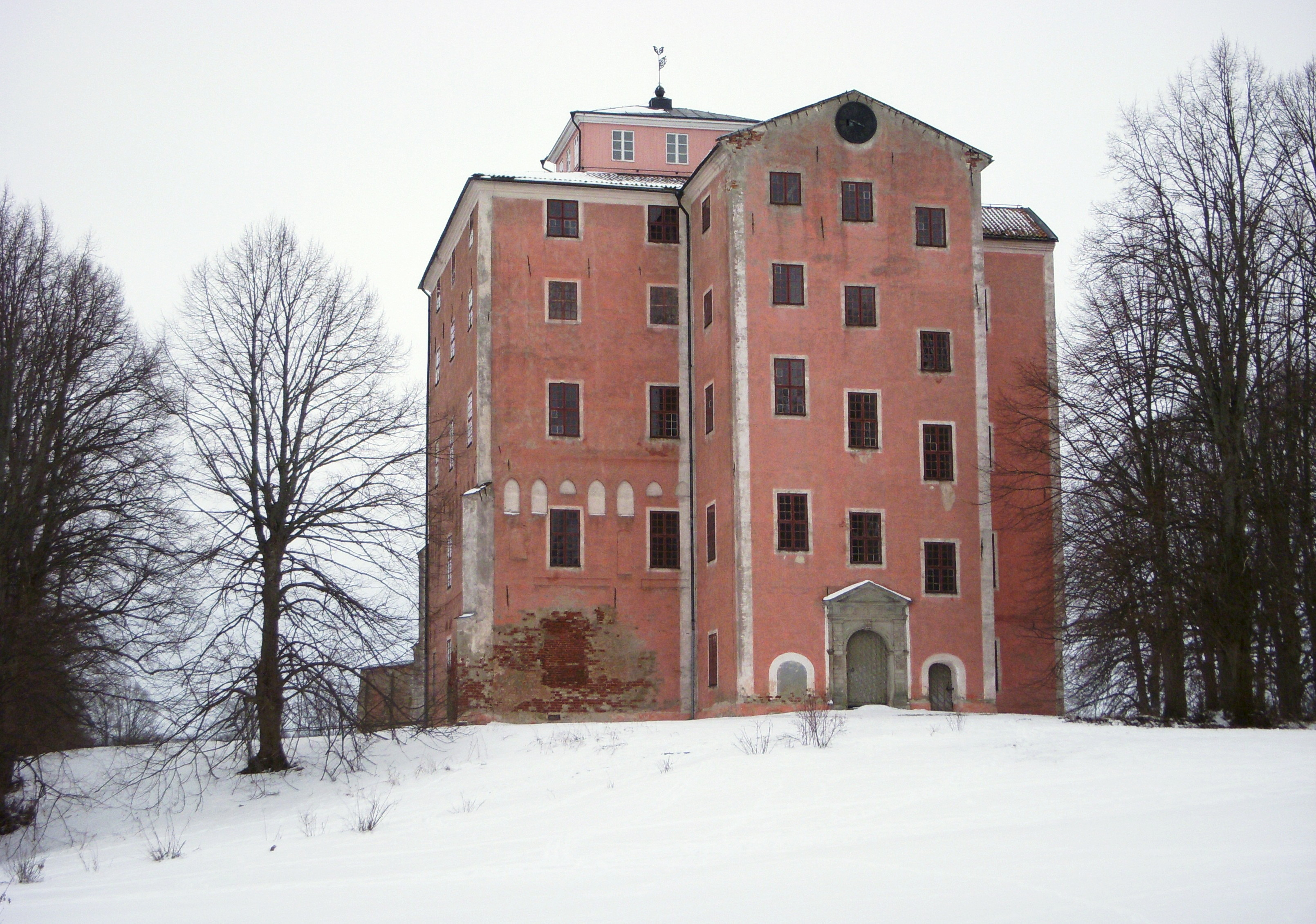 Tynnelsö slott i Strängnäs kommun